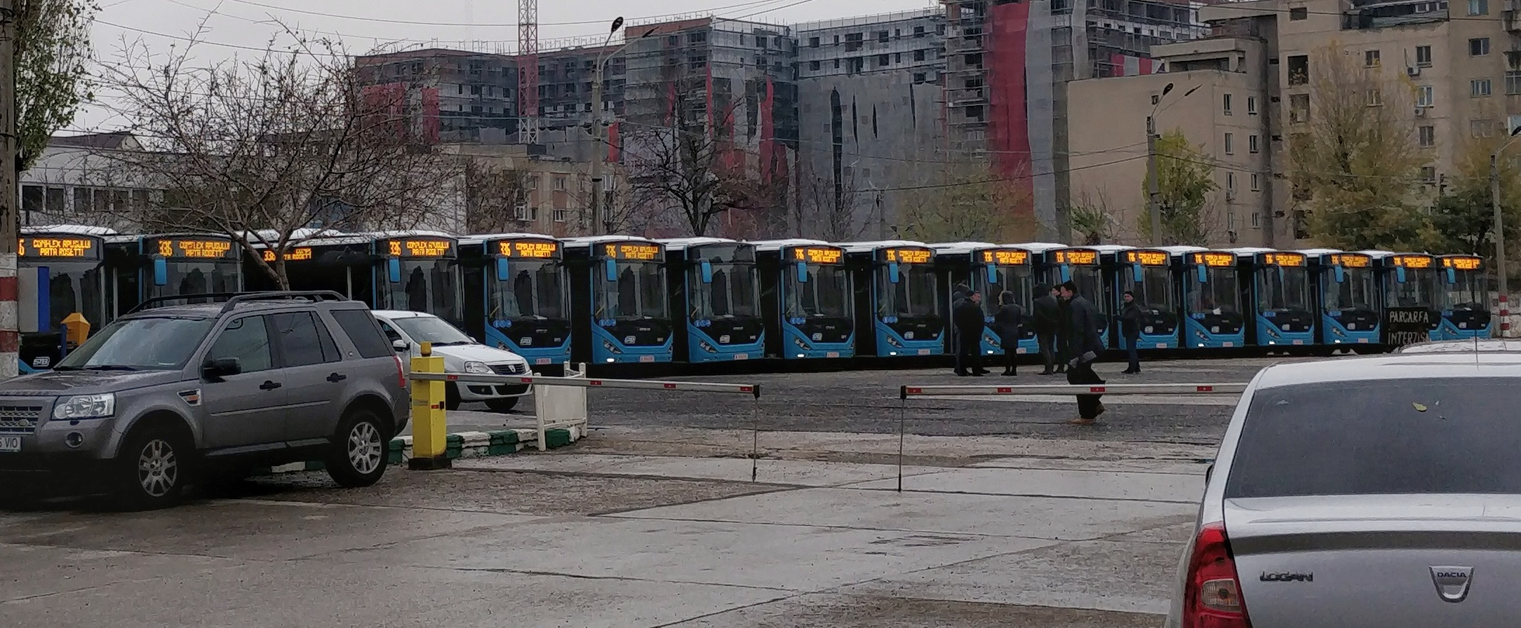 Primele 16 autobuze Otokar la livrarea lor către Autobaza Militari a STB pe 22 noiembrie 2018